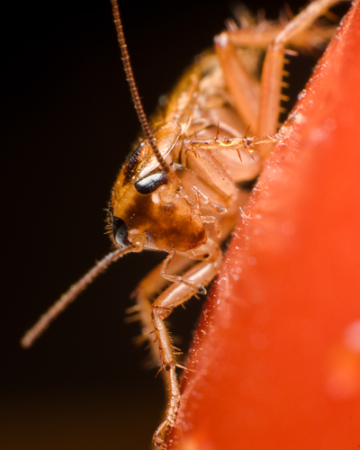 Prusak pozujący na pomidorze